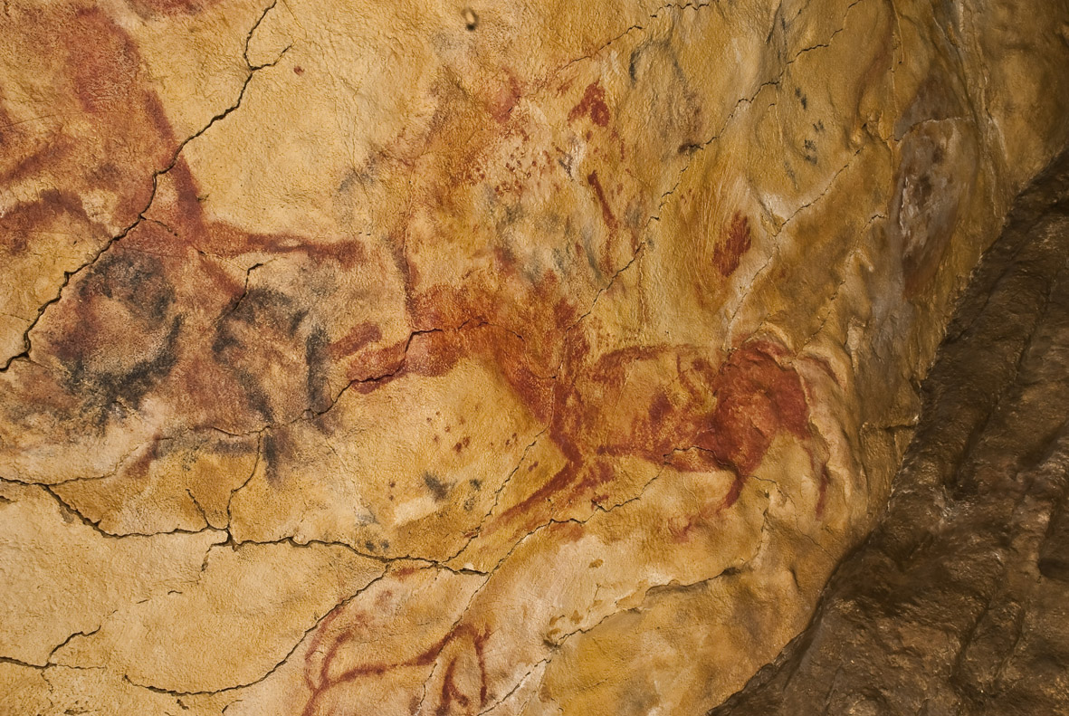 Manos en negativo de Altamira y caballos rojos